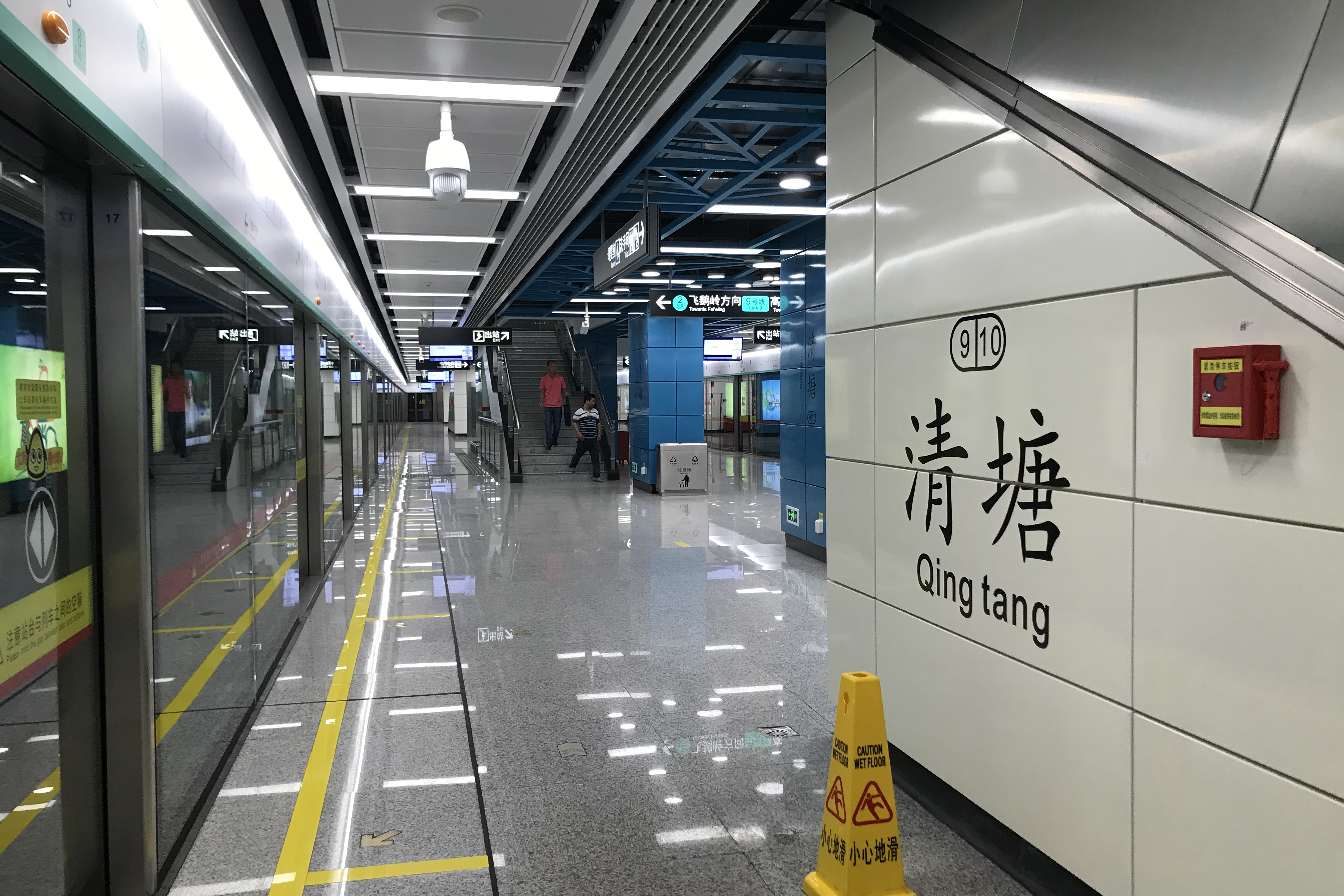 广州地铁清塘站